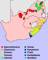 Tuislande van die voor-1994 Suid-Afrikaanse bedeling, waarvan sommige by tye deur die Suid-Afrikaanse regering as onafhanklik geag is